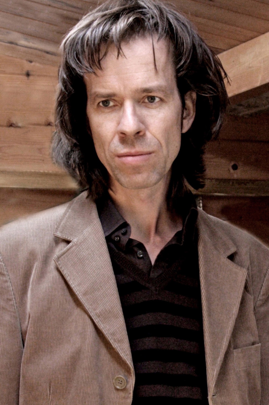 actor portrait